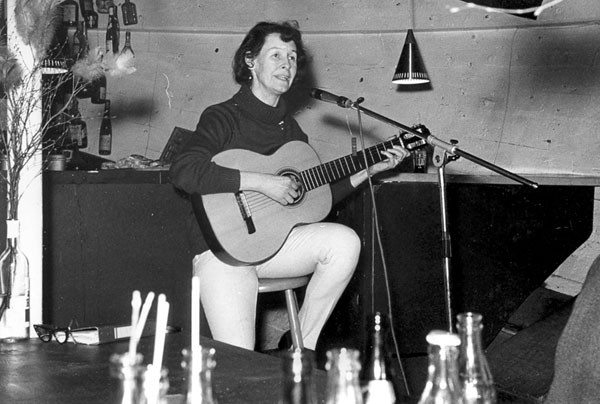 BIRGITTA HYLIN (1915–1988) VID ETT FRAMTRÄDANDE PÅ VISPRÅMEN STORKEN PÅ SMEDSUDDEN